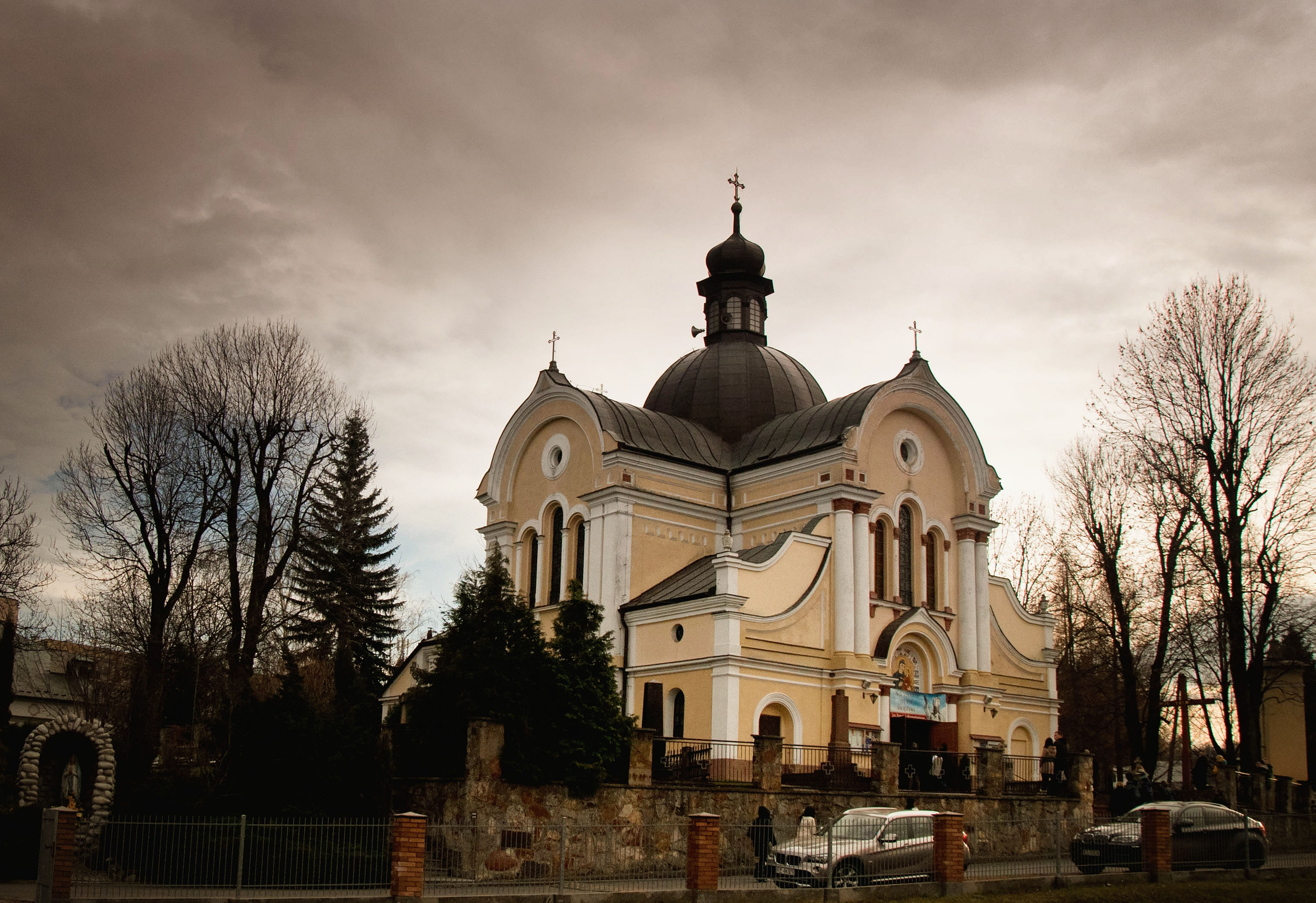 Rzeszów, ul. Zelwerowicza 2 - pierwotnie cerkiew greckokatolicka, obecnie rzymskokatolicki kościół parafialny pw. Wniebowzięcia NMP, 1889